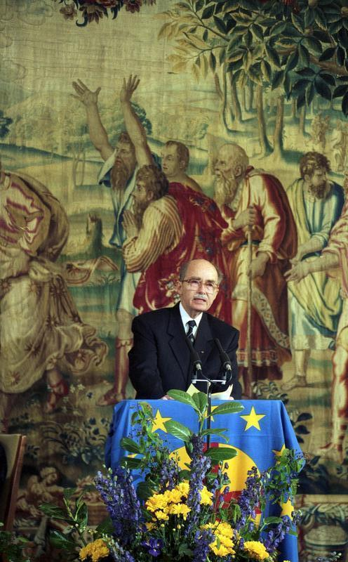 Bonn, 29.4.1991 Für überragende Leistungen in der Europapolitik, für die erfolgreiche deutsche Wiedervereinigung und als Motor der gesamteuropäischen Einigung wurde Bundeskanzler Dr. Helmut Kohl während einer Feierstunde im Palais Schaumburg mit dem Coudenhove-Kalergi-Preis ausgezeichnet. Der Präsident der Paneuropa-Union, Europaabgeordneter Otto von Habsburg und der Präsident der Coudenhove-Kalergi-Stiftung, Gerard Bauer, überreichten dem Bundeskanzler in Anwesenheit des ehemaligen französischen Premierminister, Raymond Barre, den Coudenhove-Kalergi-Preis.